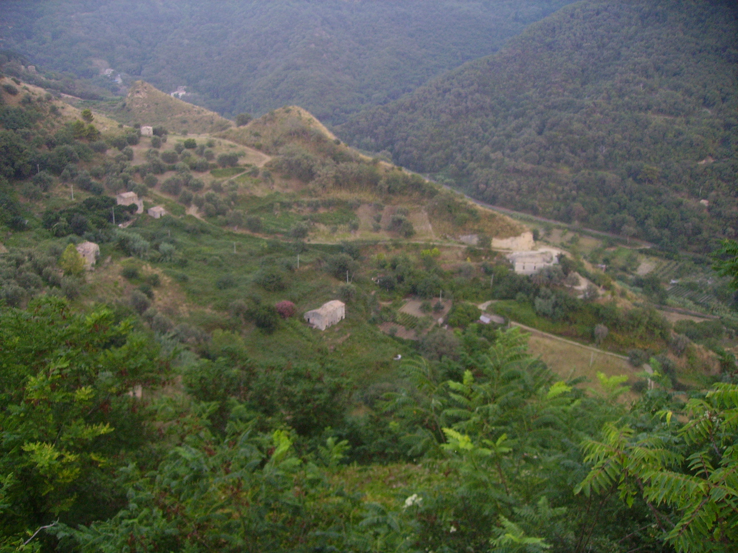 Montagna di Belmonte Calabro